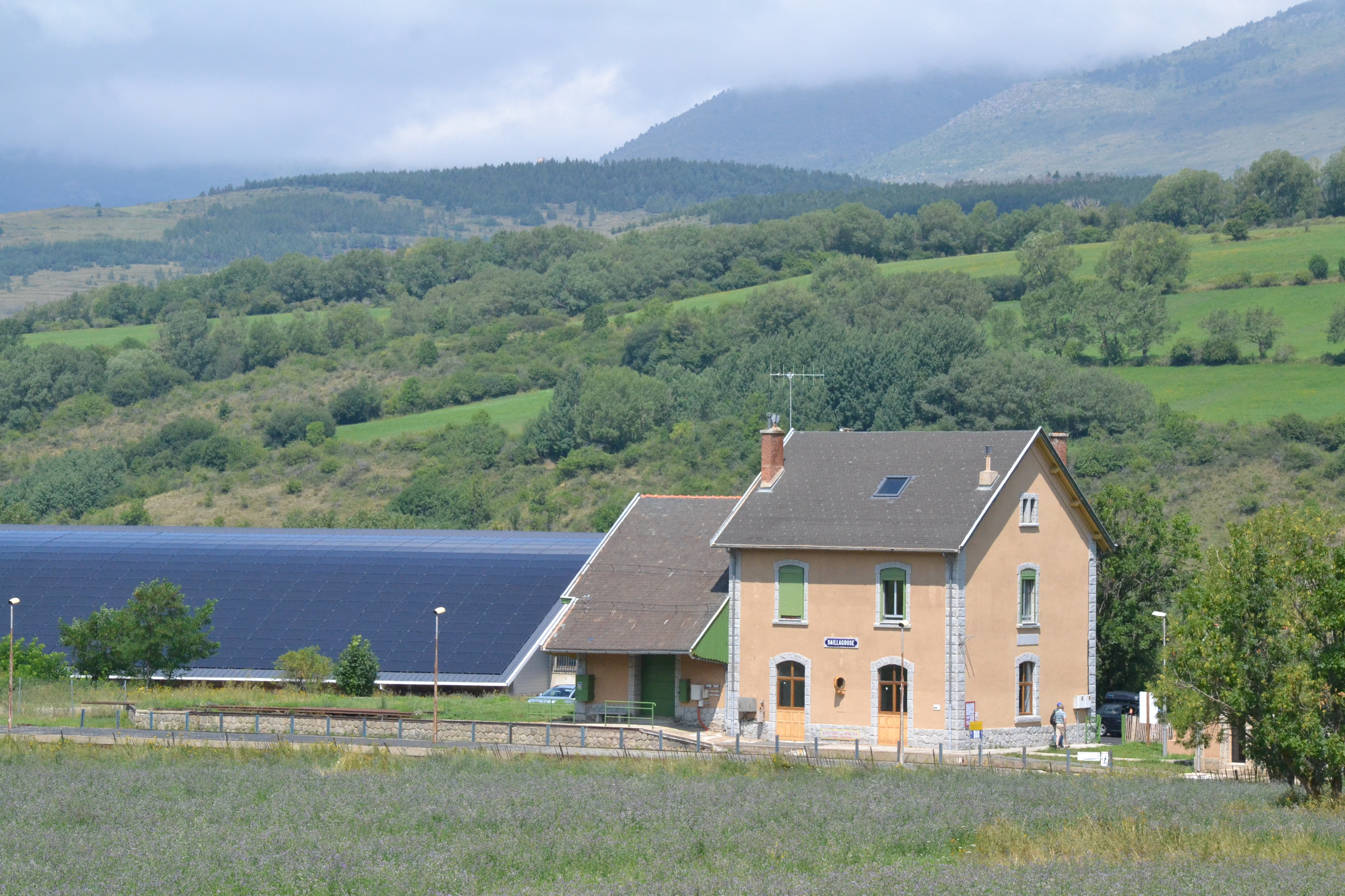 Gare de Saillagouse, ligne de Cerdagne (Pyrénées-Orientales, France).